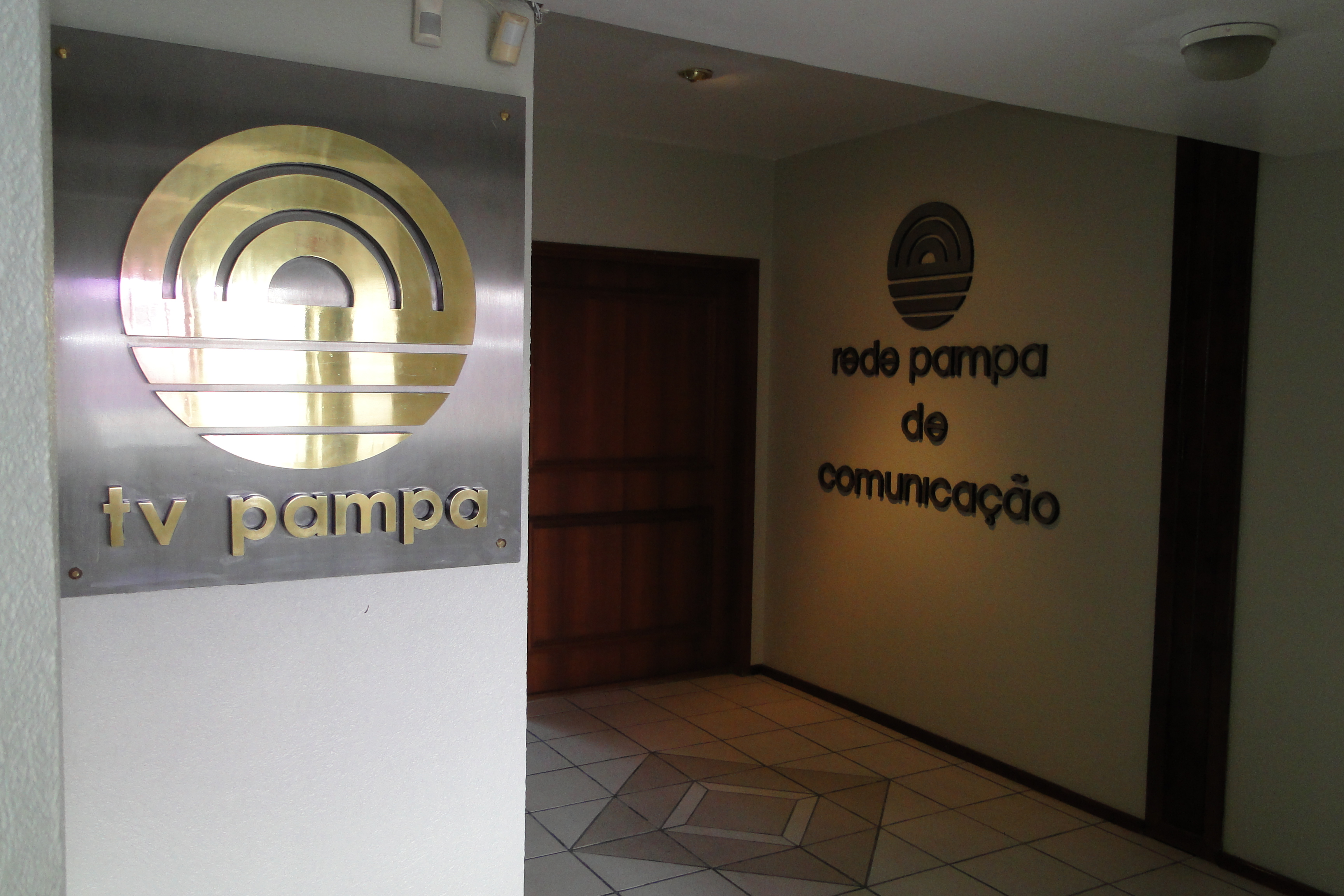 Sede da TV Pampa Centro em Santa Maria, RS, Brasil.